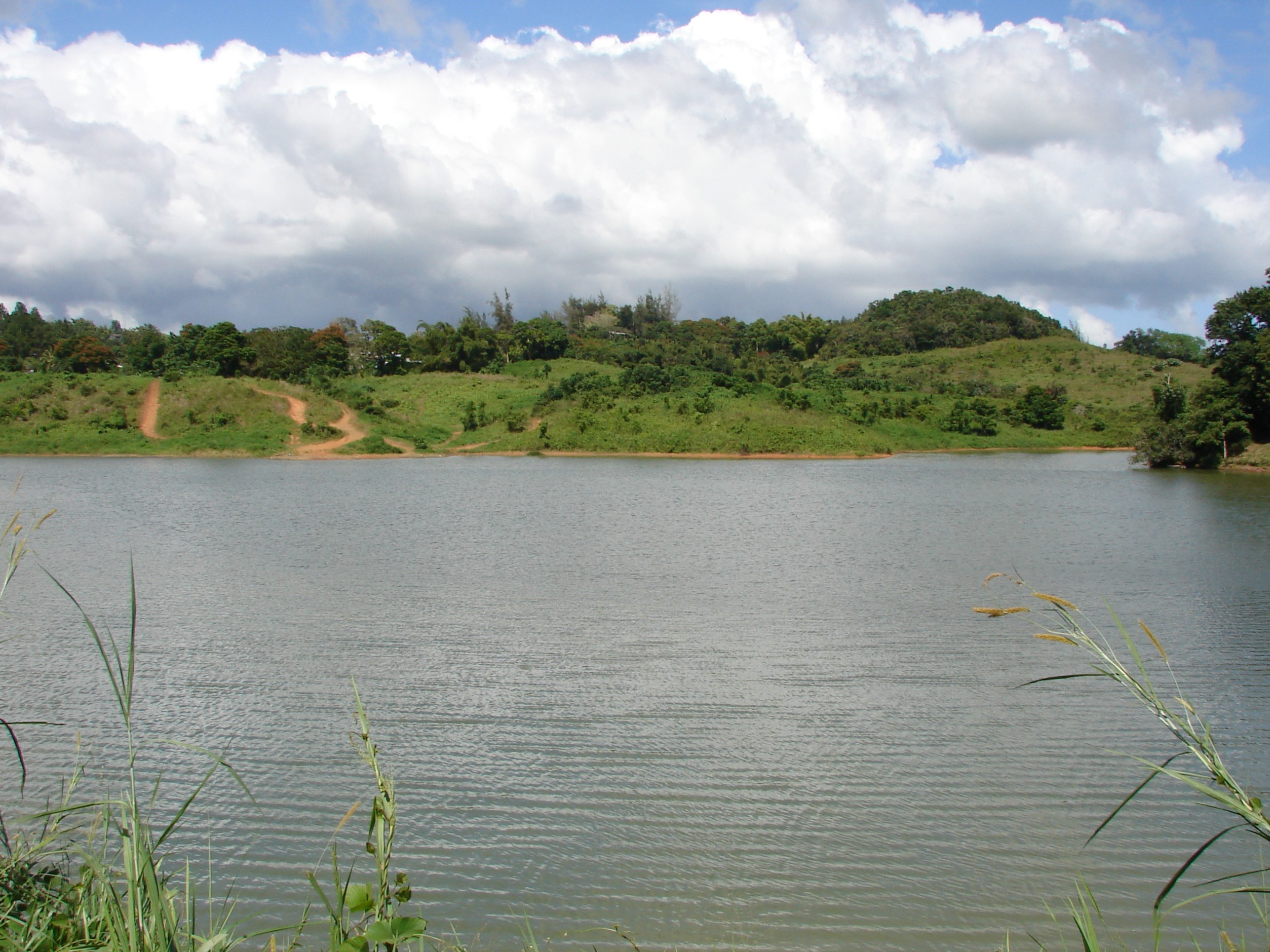 Lago de Cidra, Cidra, Puerto Rico